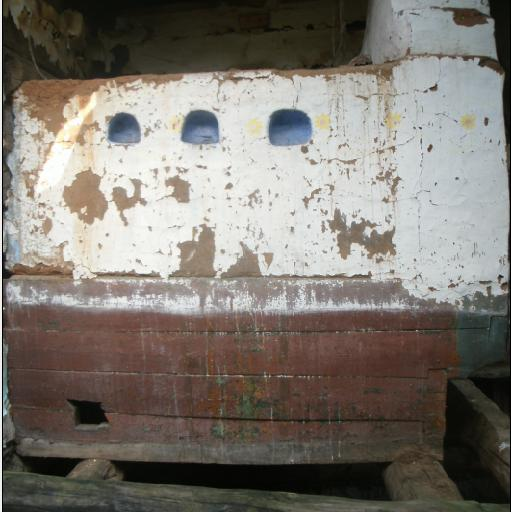 Русская печка, деревня Клычёво. Отстутсвие фундамена под печкой - национальная особенность устройства избы у сицкарей